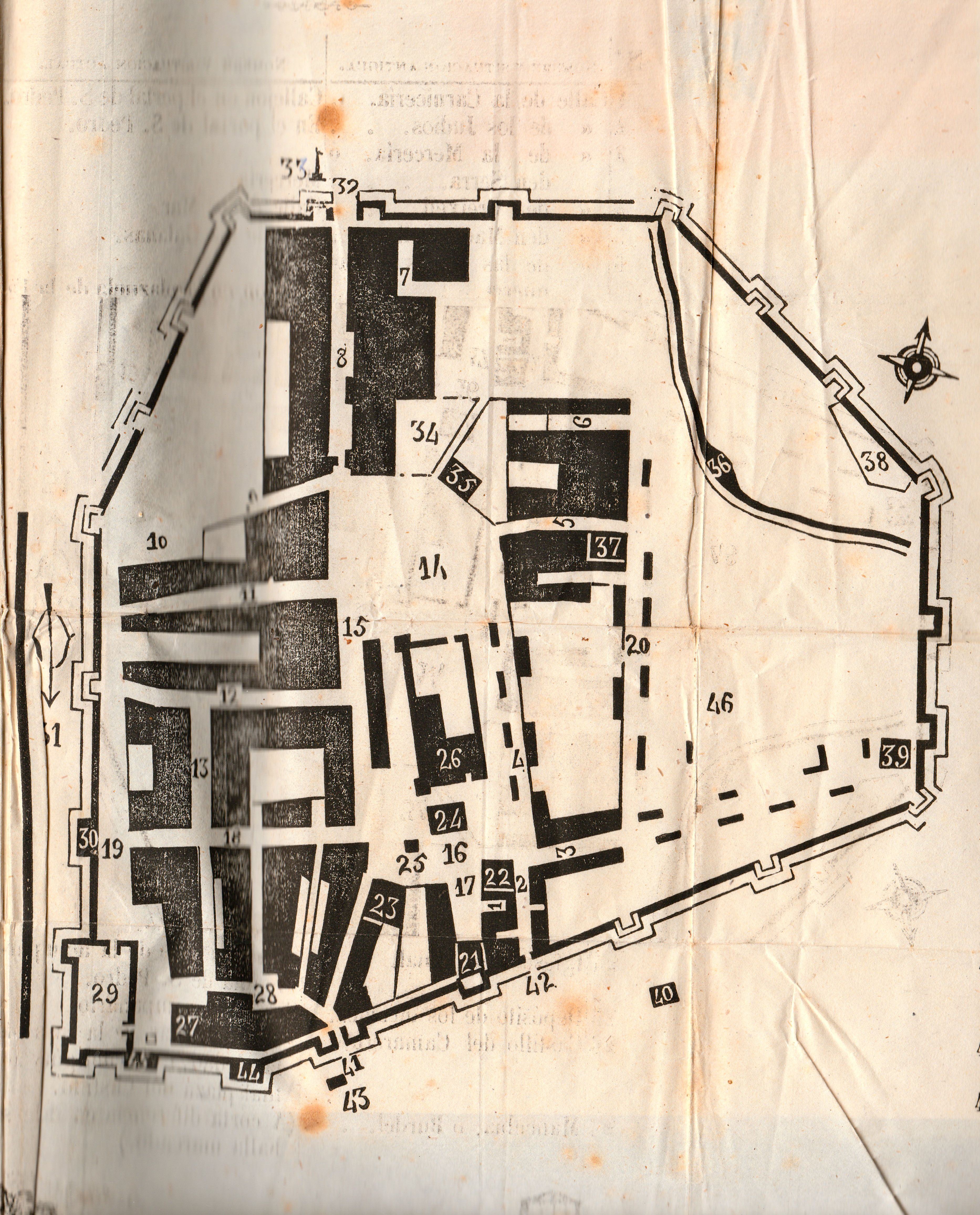 Dibuix del llibre Anales históricos de Reus, d'Andreu de Bofarull, publicat el 1866